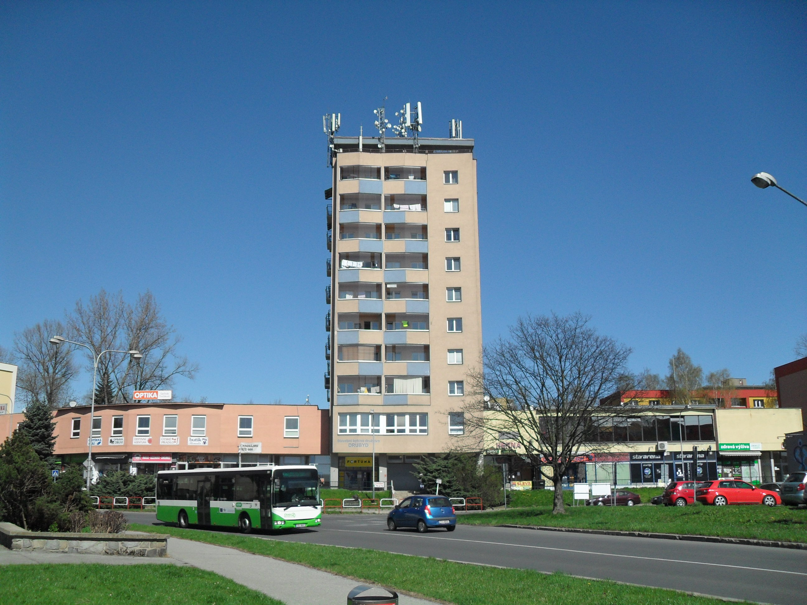 Budova Drubyd, Ciolkovského 625/54, Karviná-Ráj.